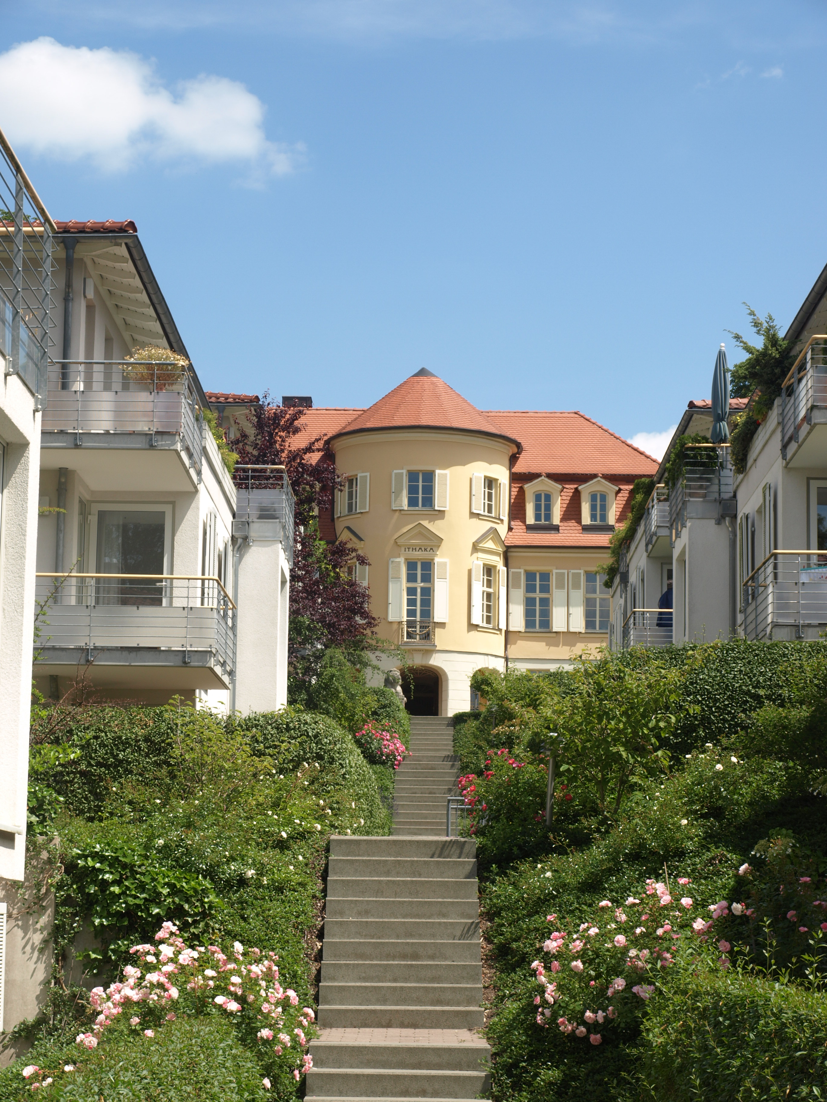 Haus Ithaka, Am Horn, Weimar (Deutschland)